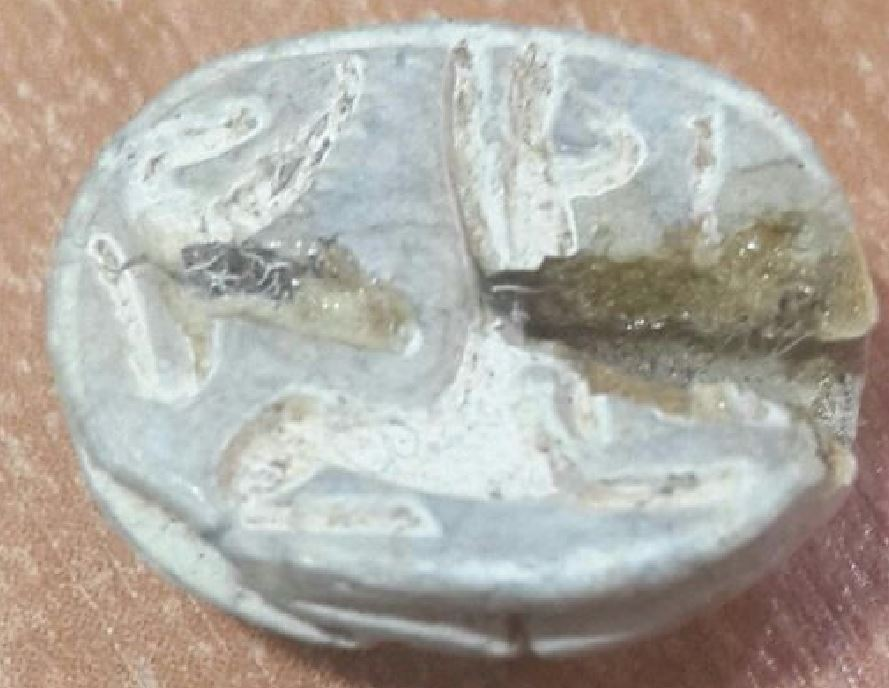 חרפושית שנמצאה בשפוכת החפירה משנת 1997